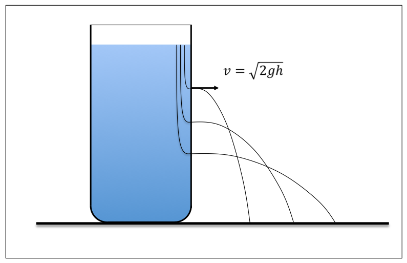 Likidoz beteriko ontzian eginiko zuloetatik irtenen diren txorrotaden ibilbideak